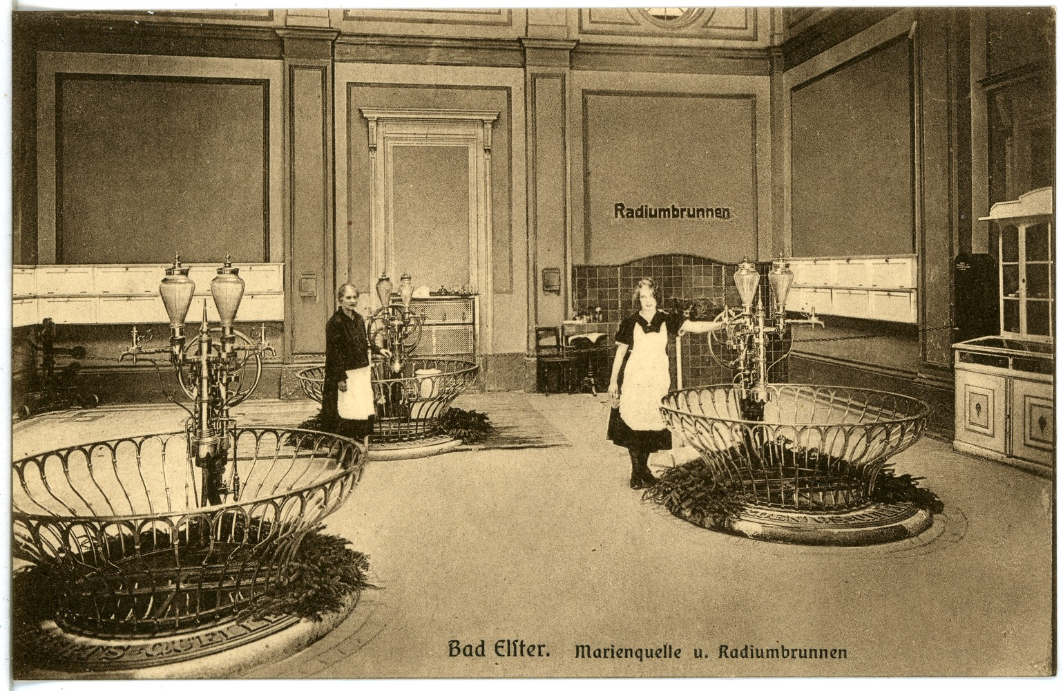 Bad Elster; Marienquelle und Radiumbrunnen This postcard is from publisher Brück & Sohn in Meißen ( postcard has a unique number 22847 and is available in a higher resolution at the publisher. This images was uploaded in a cooperation project between Wikipedians and the publisher.